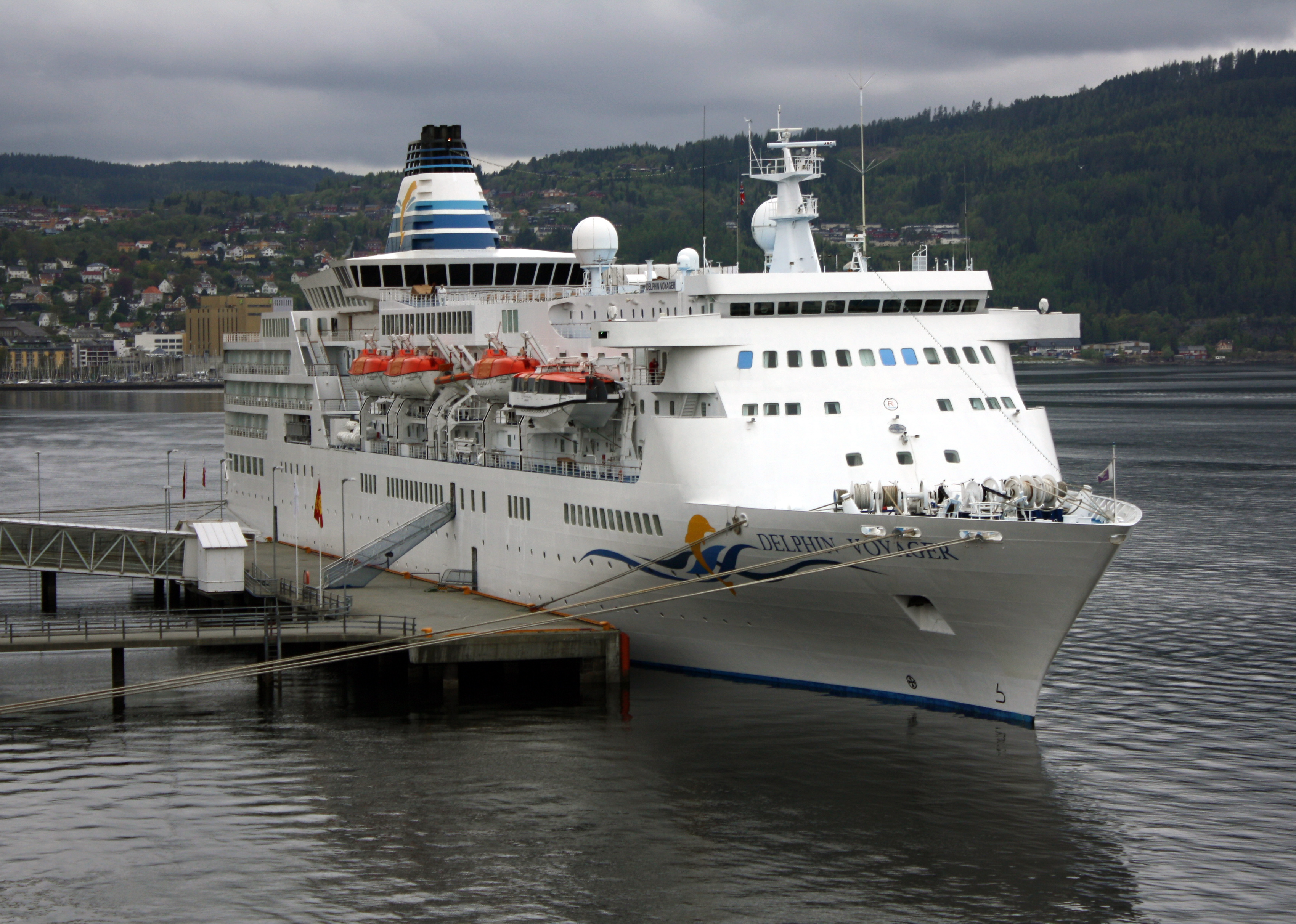 Cruiseskipet Delphin Voyager ved Turistskipskaia i Trondheim 28. mai 2010.